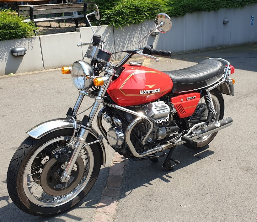 Moto Guzzi 850 T / Produktionszeit 1974 - 75 / Stückzahl 2682 / 2 ZylV-Motor OHV/2V / Hubraum 844,06 ccm / 57 PS/6500/min / 5 Gänge / 184 km/h